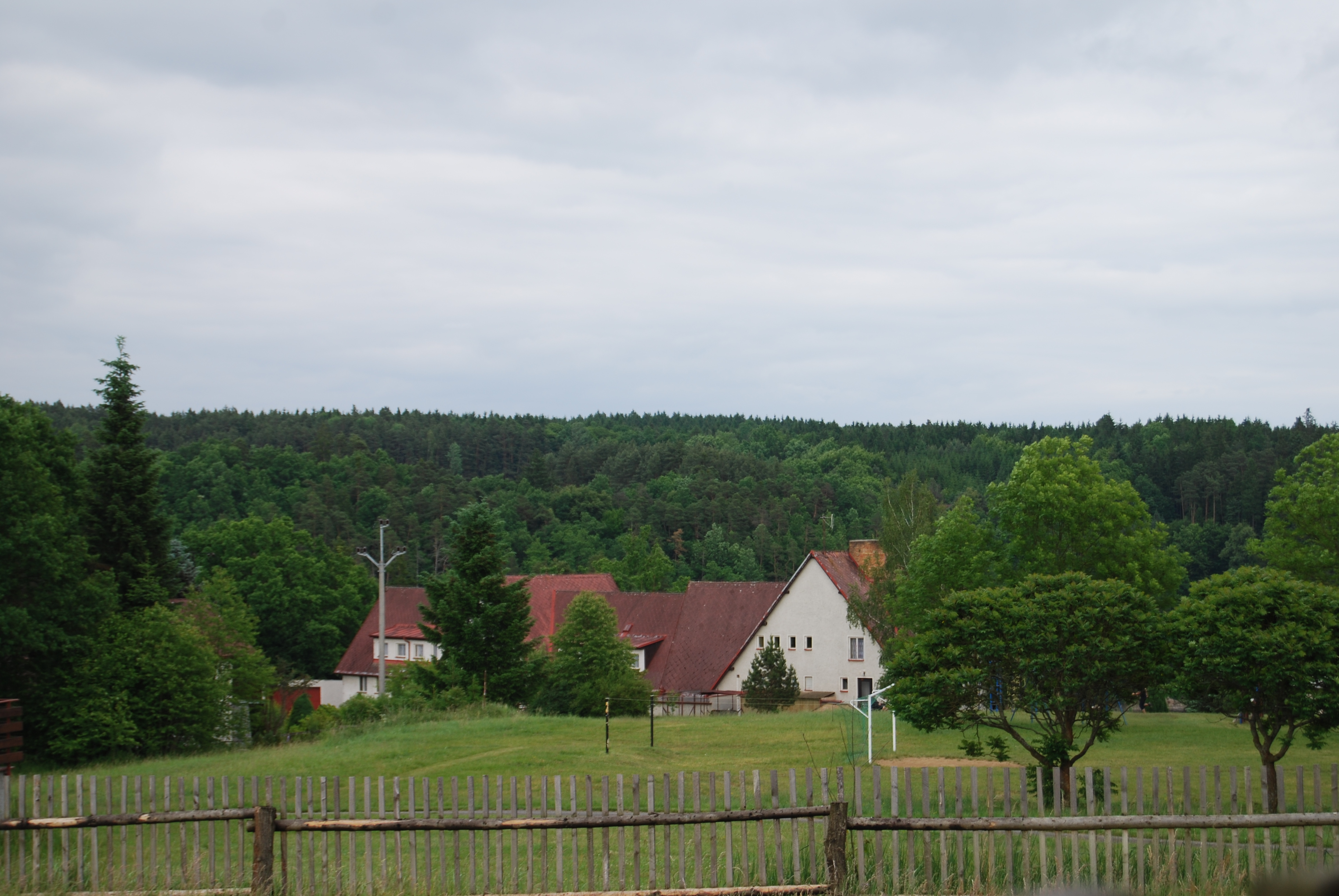 Pohled na část obce. Štědronín-Plazy je část obce Varvažov v okrese Písek. Česká republika.